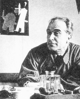 Portrait de Charles Loupot dans son atelier.